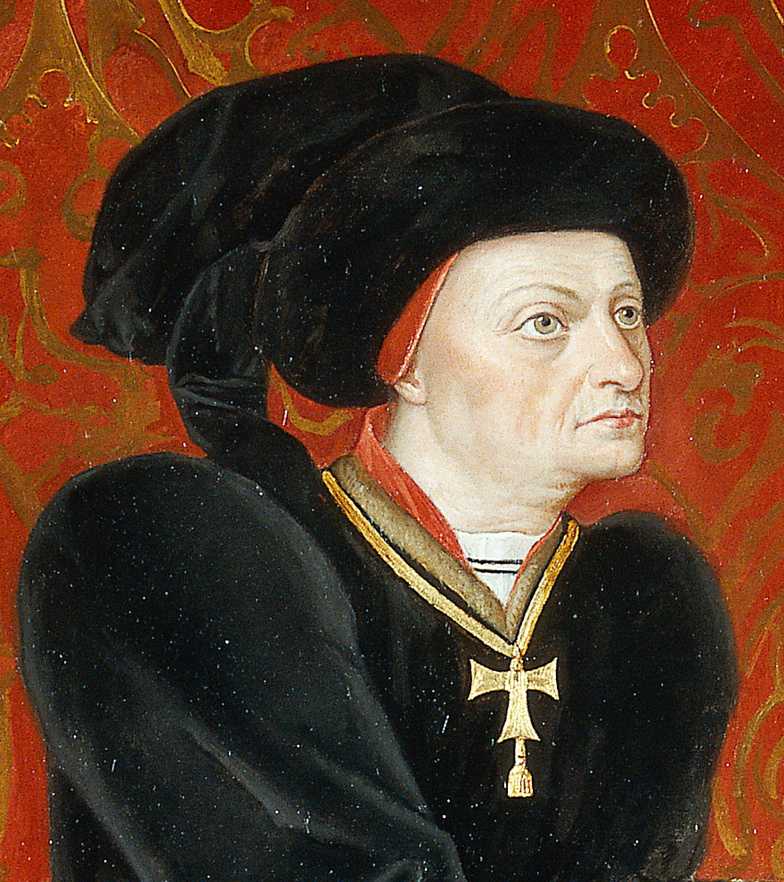 Detalle del retrato del célebre escritor y aristócrata español Íñigo López de Mendoza (1398-1458), que fue marqués de Santillana. Esta obra es una copia del retrato idéntico del marqués ubicado en el Retablo de los Gozos de Santa María o Altar de los Ángeles, que fue realizado por Jorge Inglés en 1455.